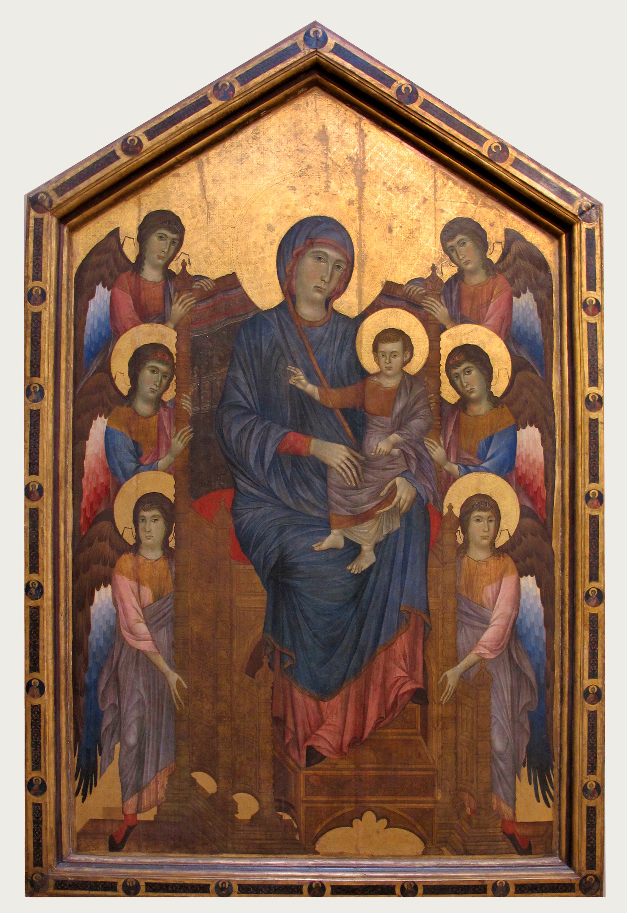 Madonna do Louvre